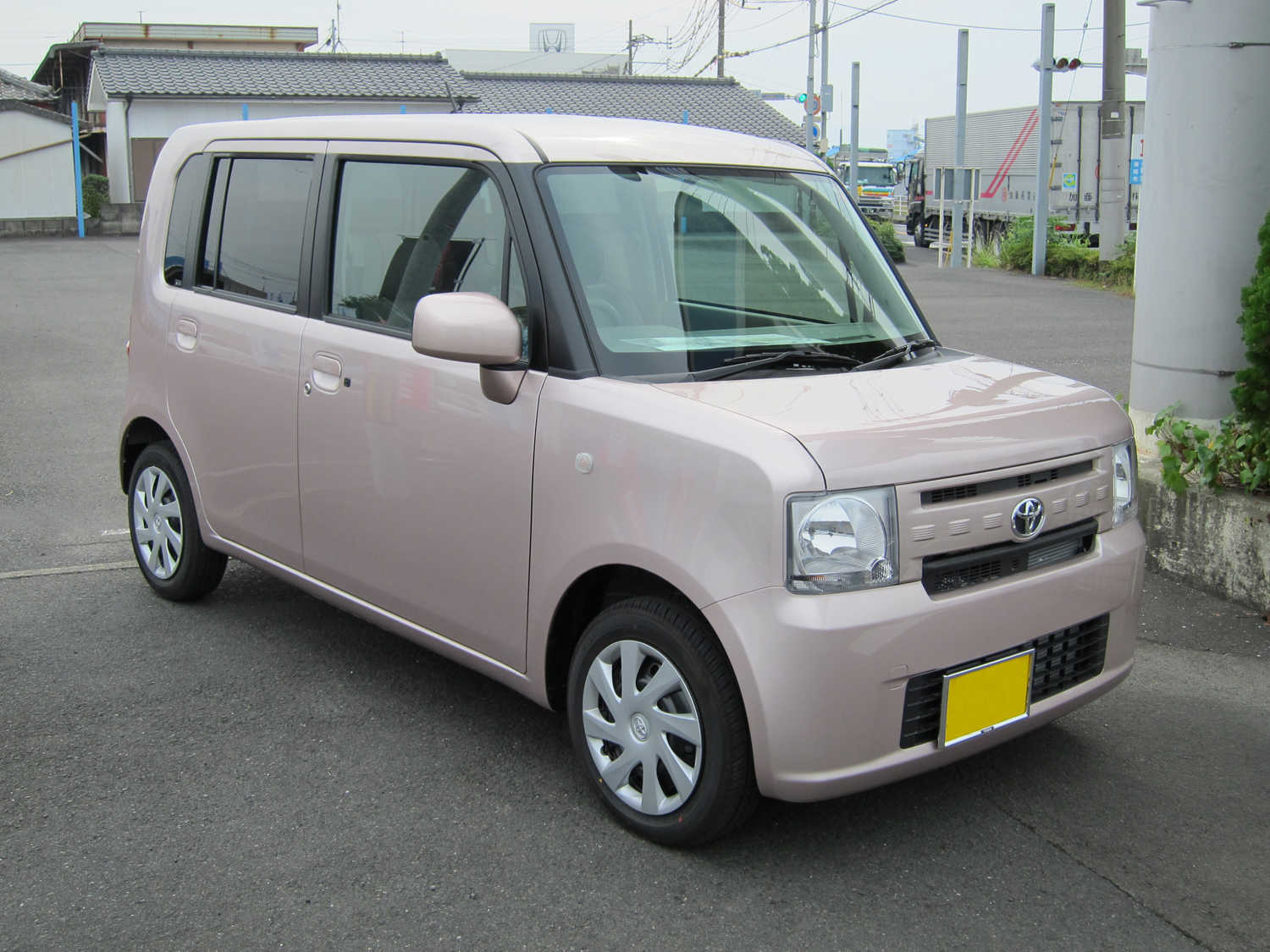 Document destiné à illustrer l'article sur la Toyota Pixis Space.